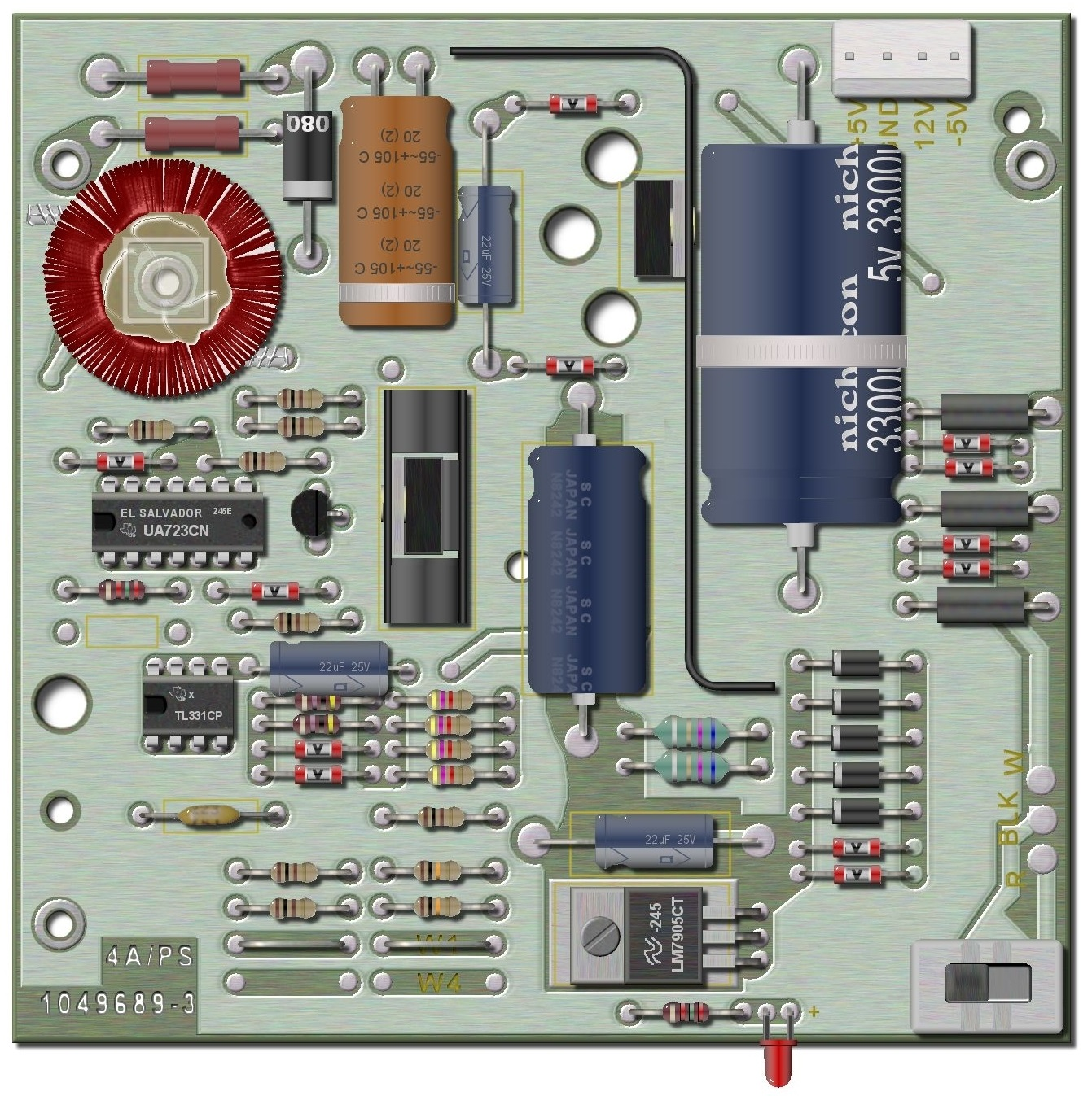 Grafik der Hauptplatine eines Texas Instruments TI-99/4A mit Stromversorgung